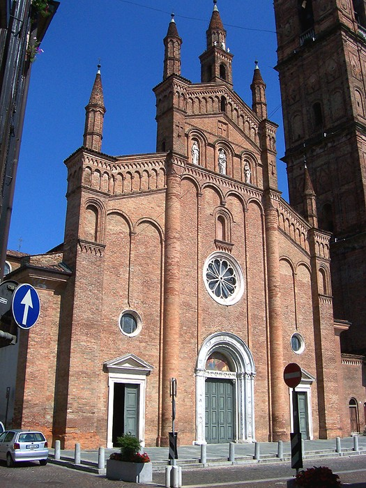 Caravaggio - Chiesa Parrocchiale dei Ss. Fermo e Rustico